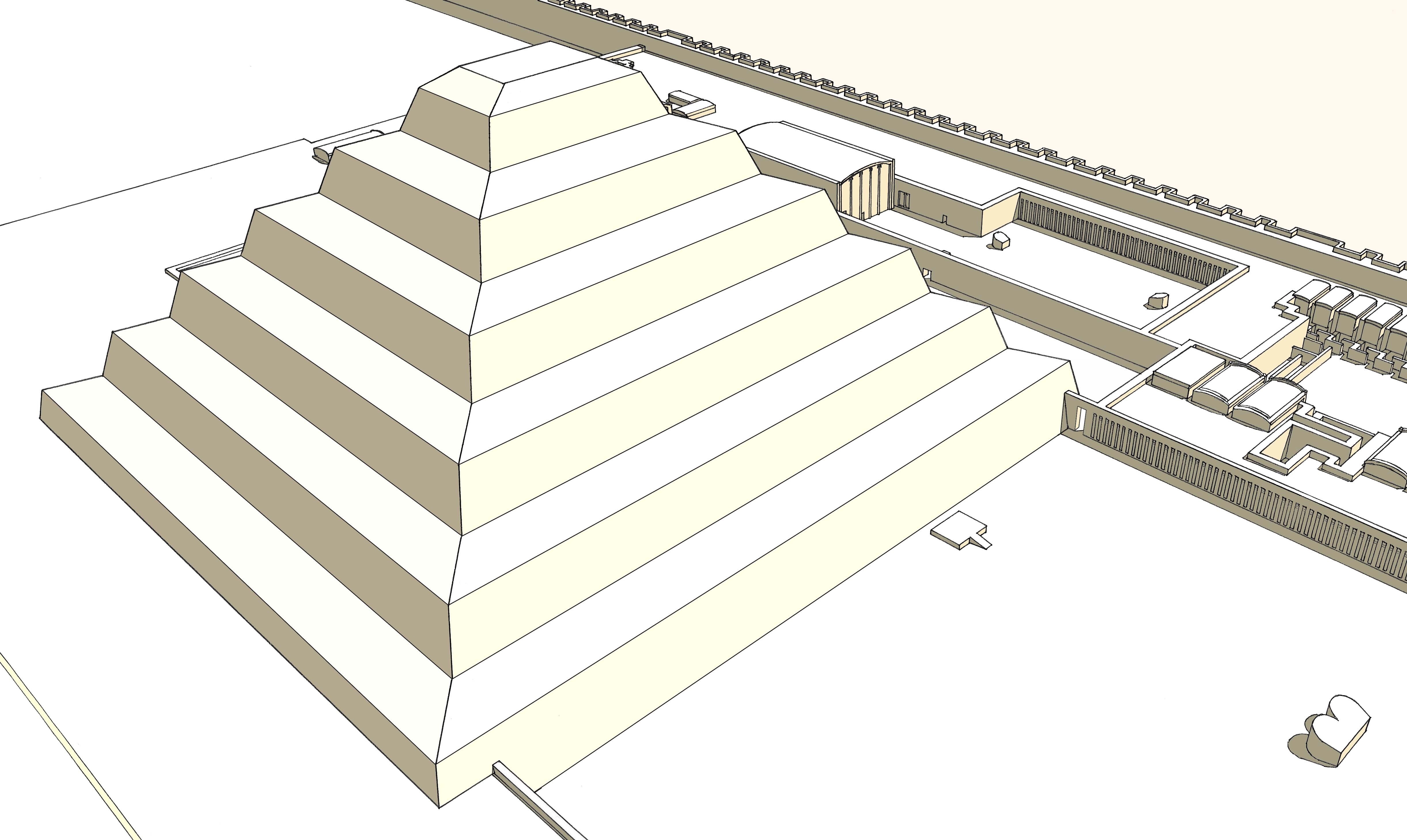 Vue générale de la pyramide de Djoser. For commercial purpose, I'd like to be notified.